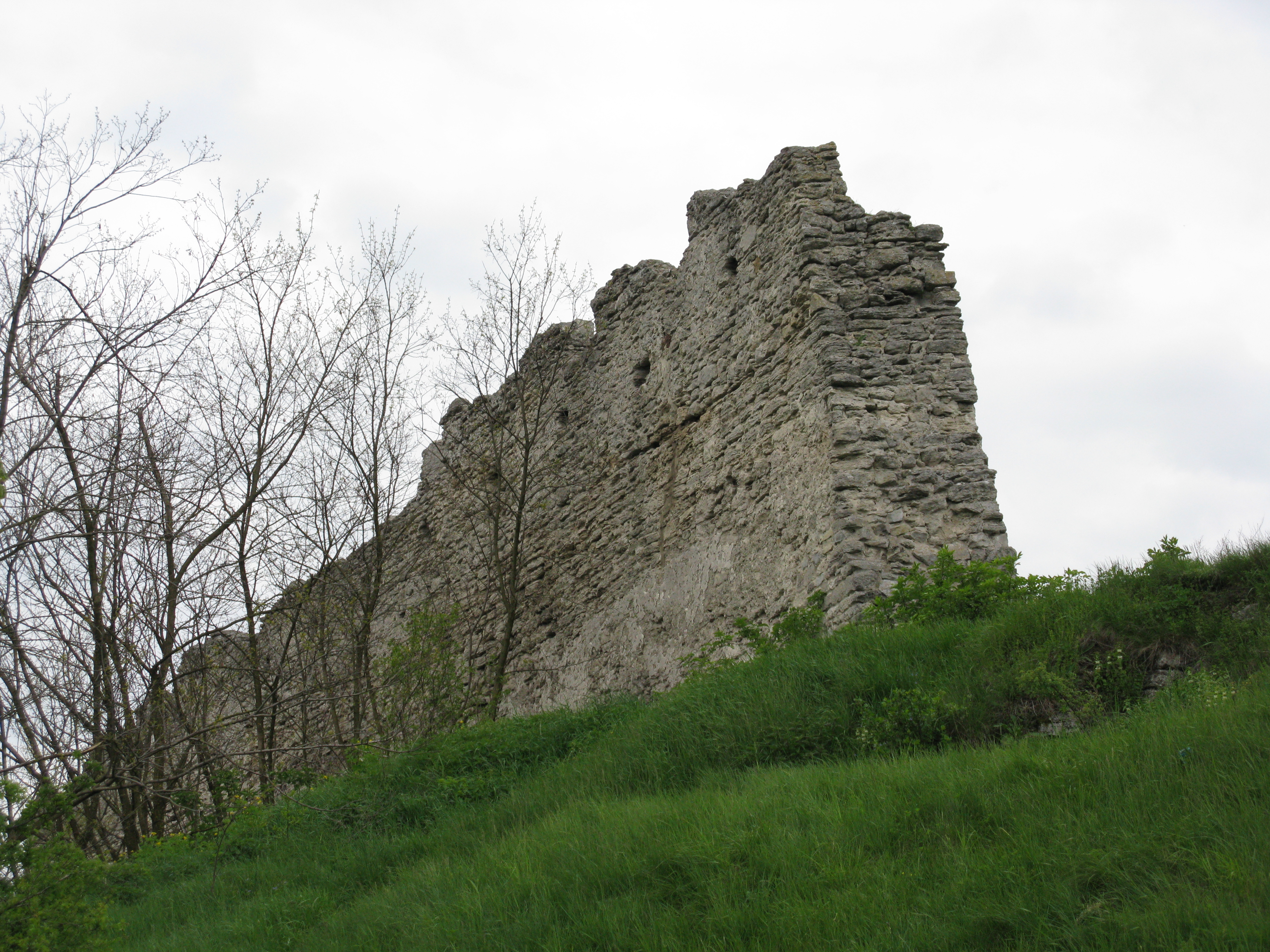 Кременець. Руїни замку.